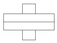 Ustrój elektrodynamiczny - symbol umieszczany na miernikach